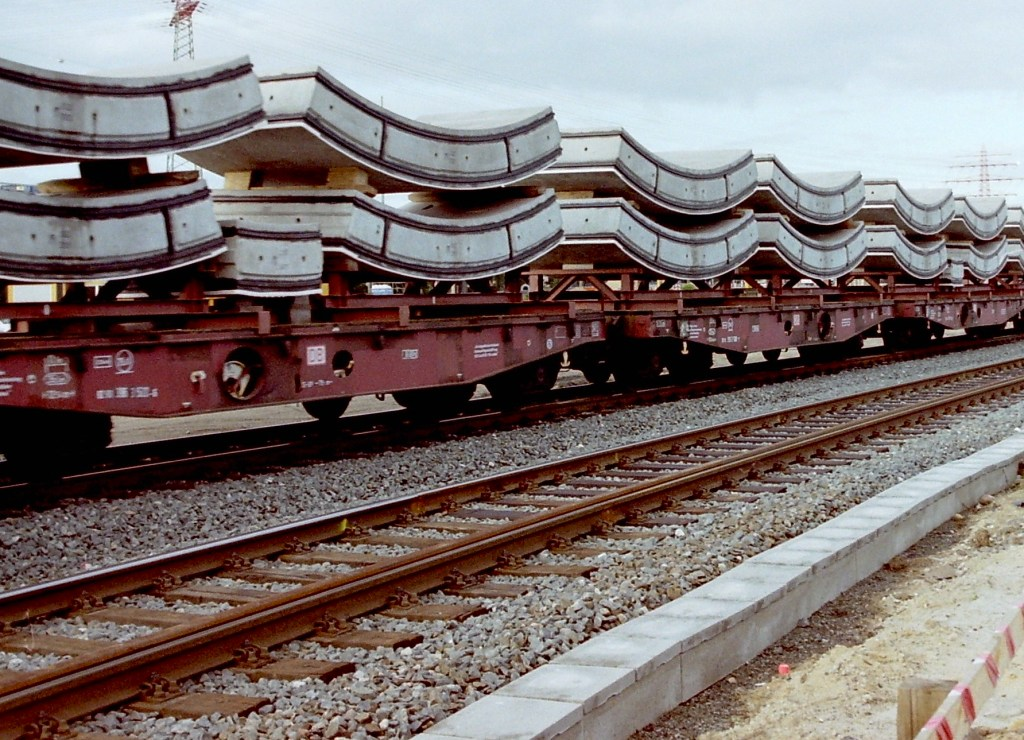 Bauelemente für den Neuen Elbtunnel